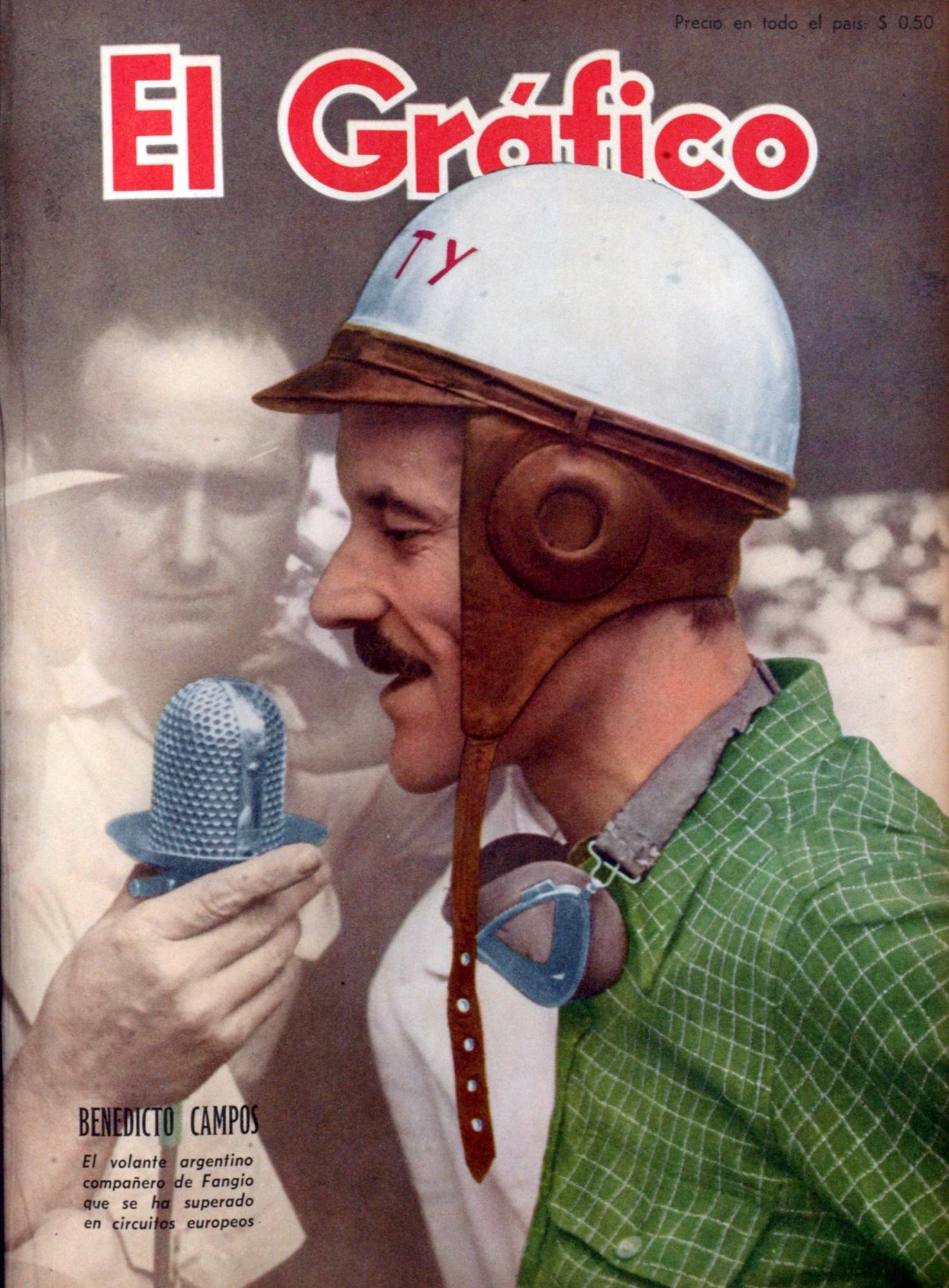 El Grafico del 10 de Junio de 1949. Edicion 1557